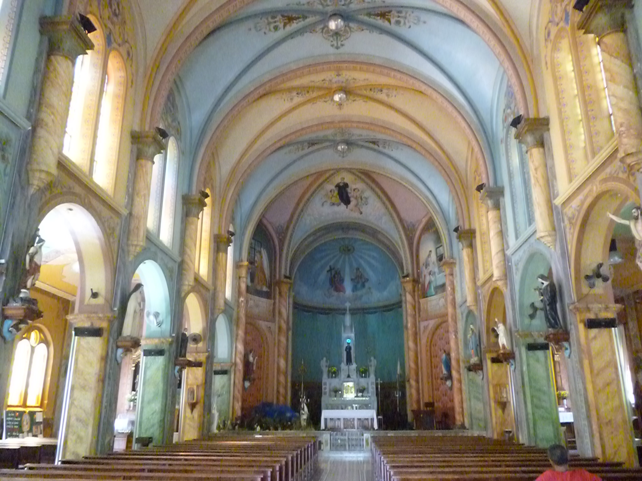 Curvelo MG Brasil - Basílica de S. Geraldo